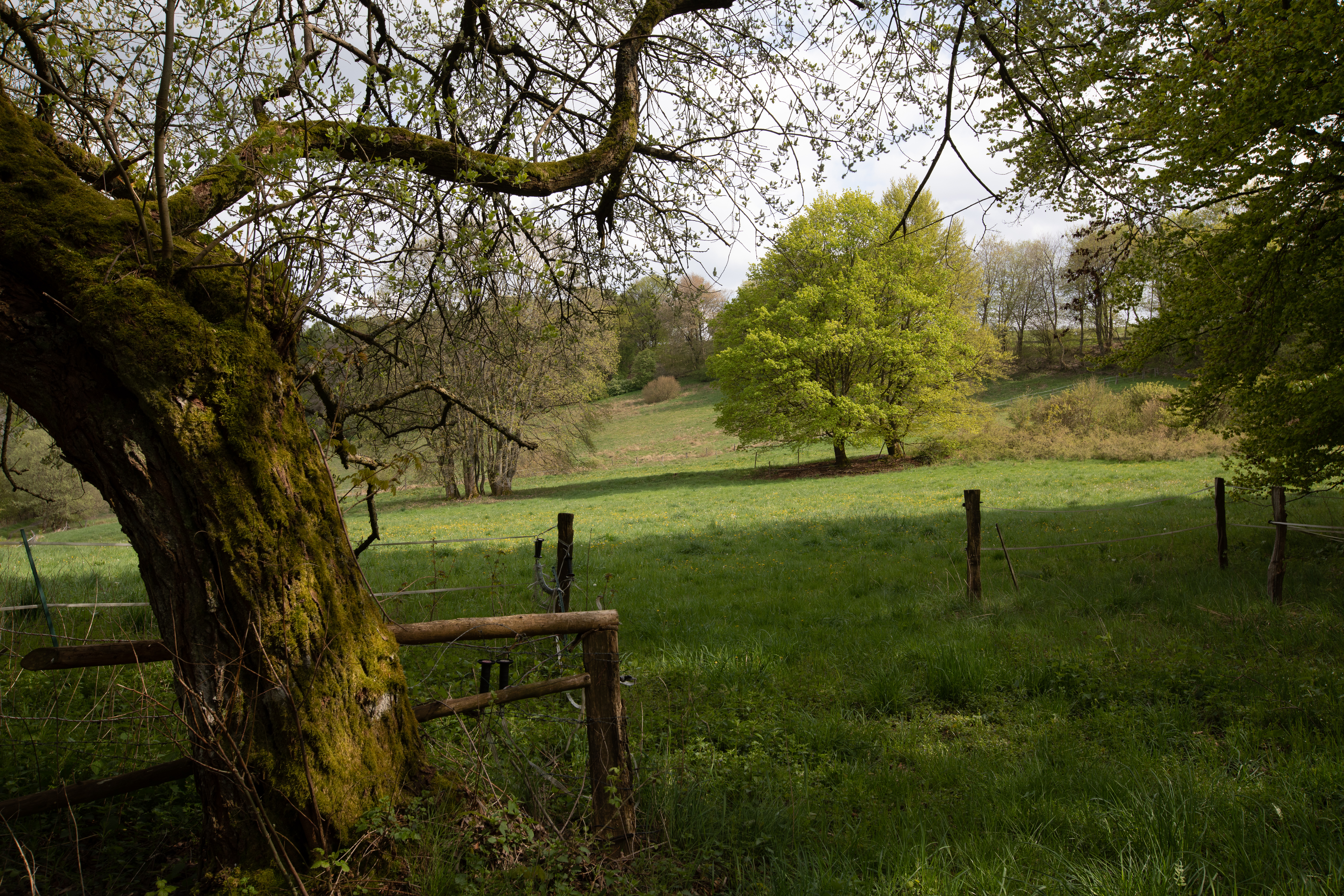 Wiesen im Mittlerern Rurtal zur Blütezeit im Mai